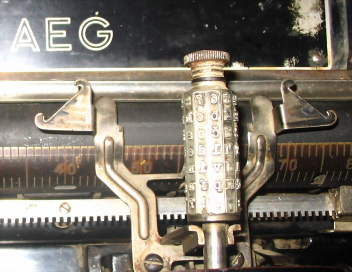 Detajl pisalnega stroja MIGNON.